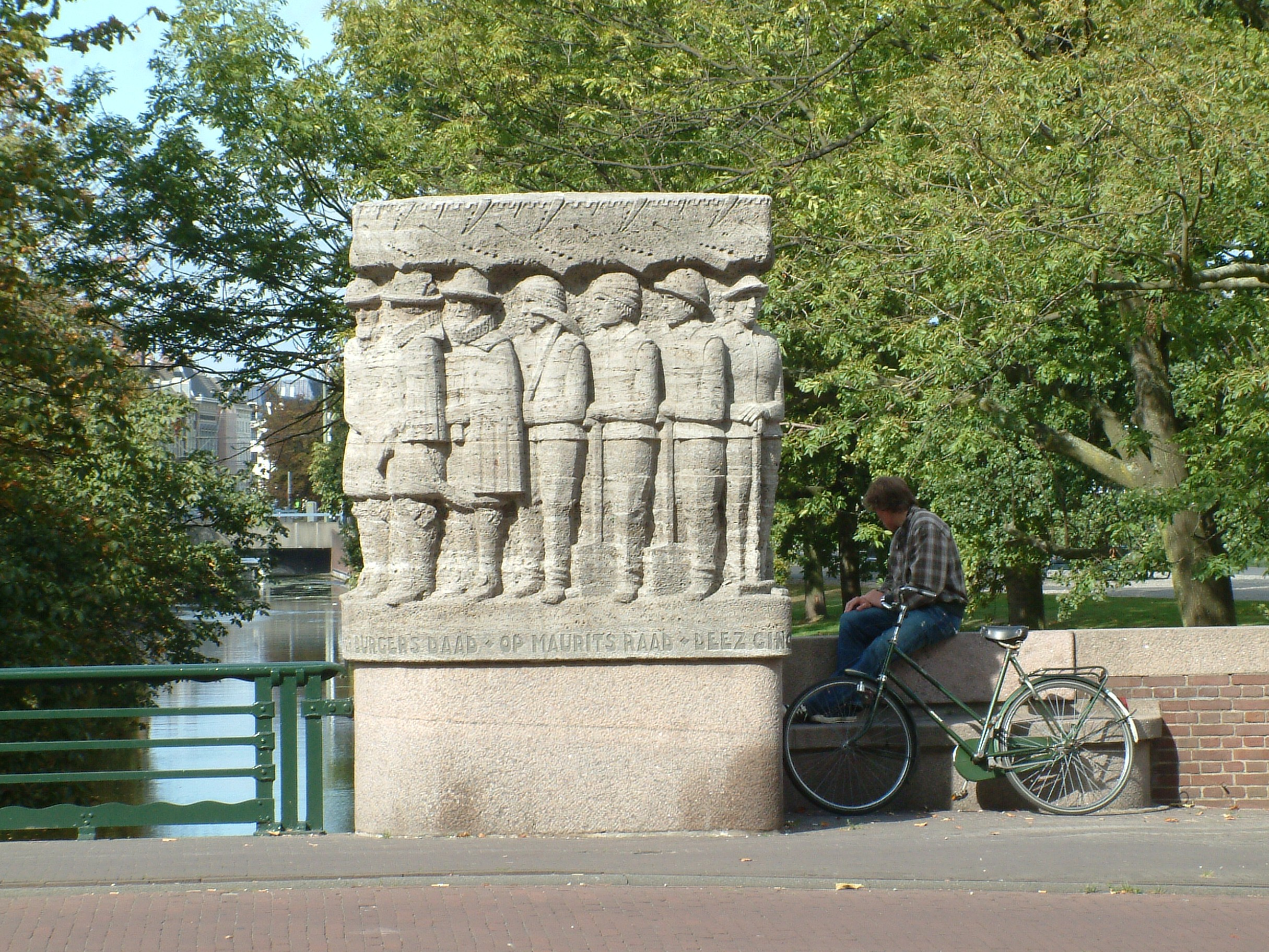 Brug in Den Haag